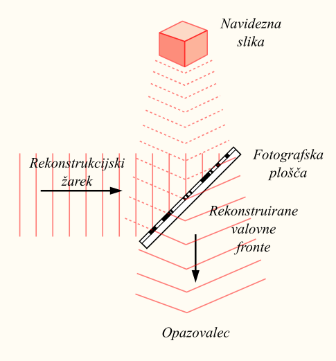 Skica rekonstrukcije optičnega holograma, povzeta po angleški Wikipediji, s prevedenim tekstom Originalna verzja: DrBob at the English language Wikipedia [GFDL ( or CC-BY-SA-3.0 ( via Wikimedia Commons